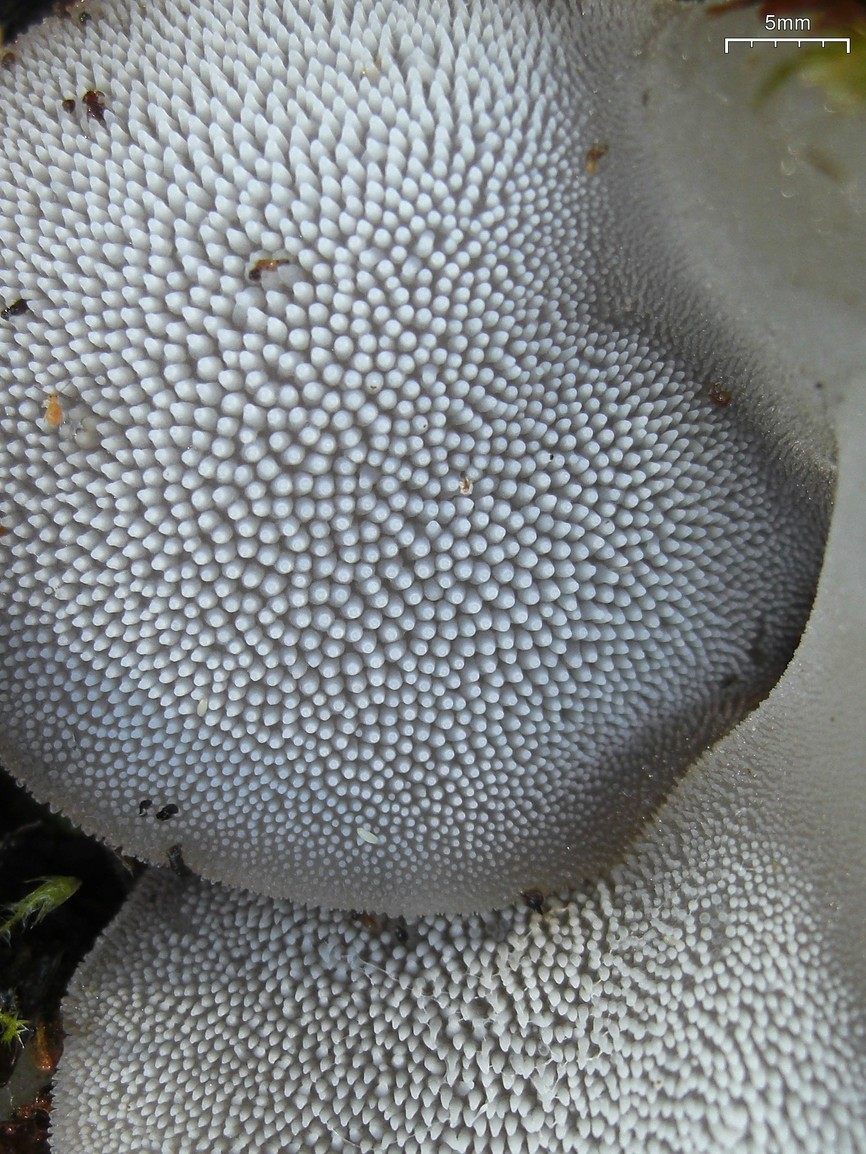 Pseudohydnum gelatinosum 20090927.45 Canada, BC, Incomappleux Inland Rainforest